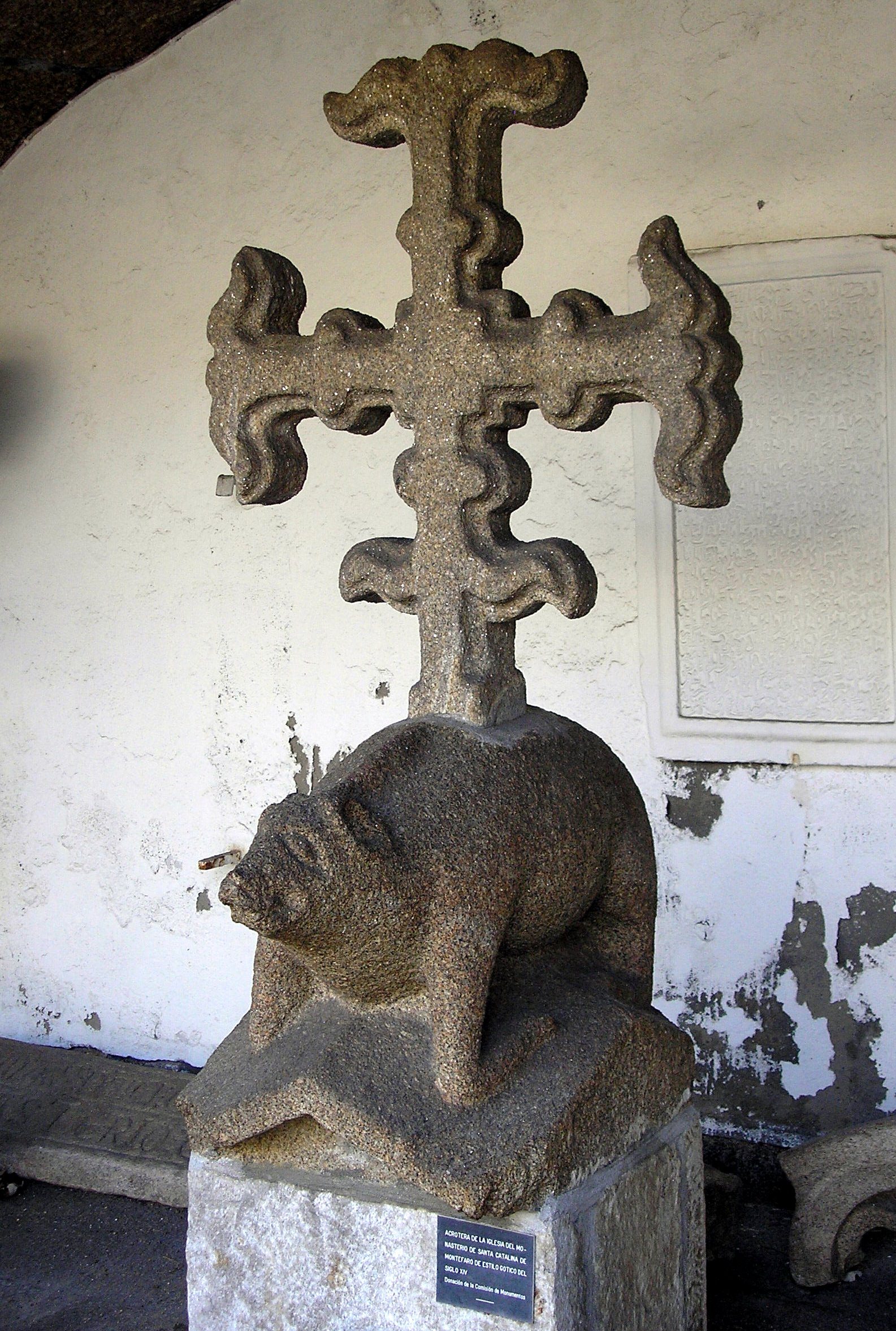 Acroteira de estilo gótico do século XIV da igrexa do mosteiro de Santa Catalina de Montefaro (Ares), exposta no Museo Arqueolóxico e Histórico do Castelo de San Antón, na Coruña